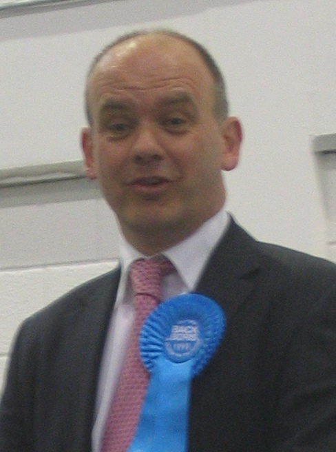 London Elections 2008, Excel count centre. Roger Evans